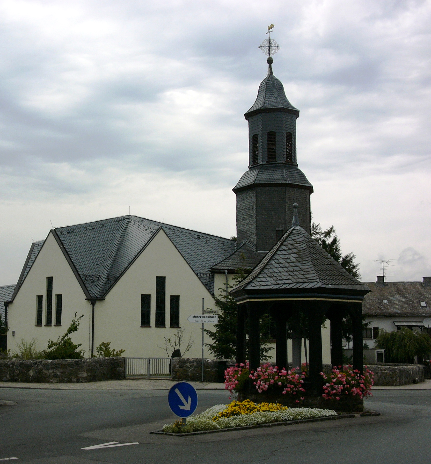 Evangelische Kirche in Aßlar-Berghausen (Lahn-Dill-Kreis, Hessen) mit Dorfbrunnen